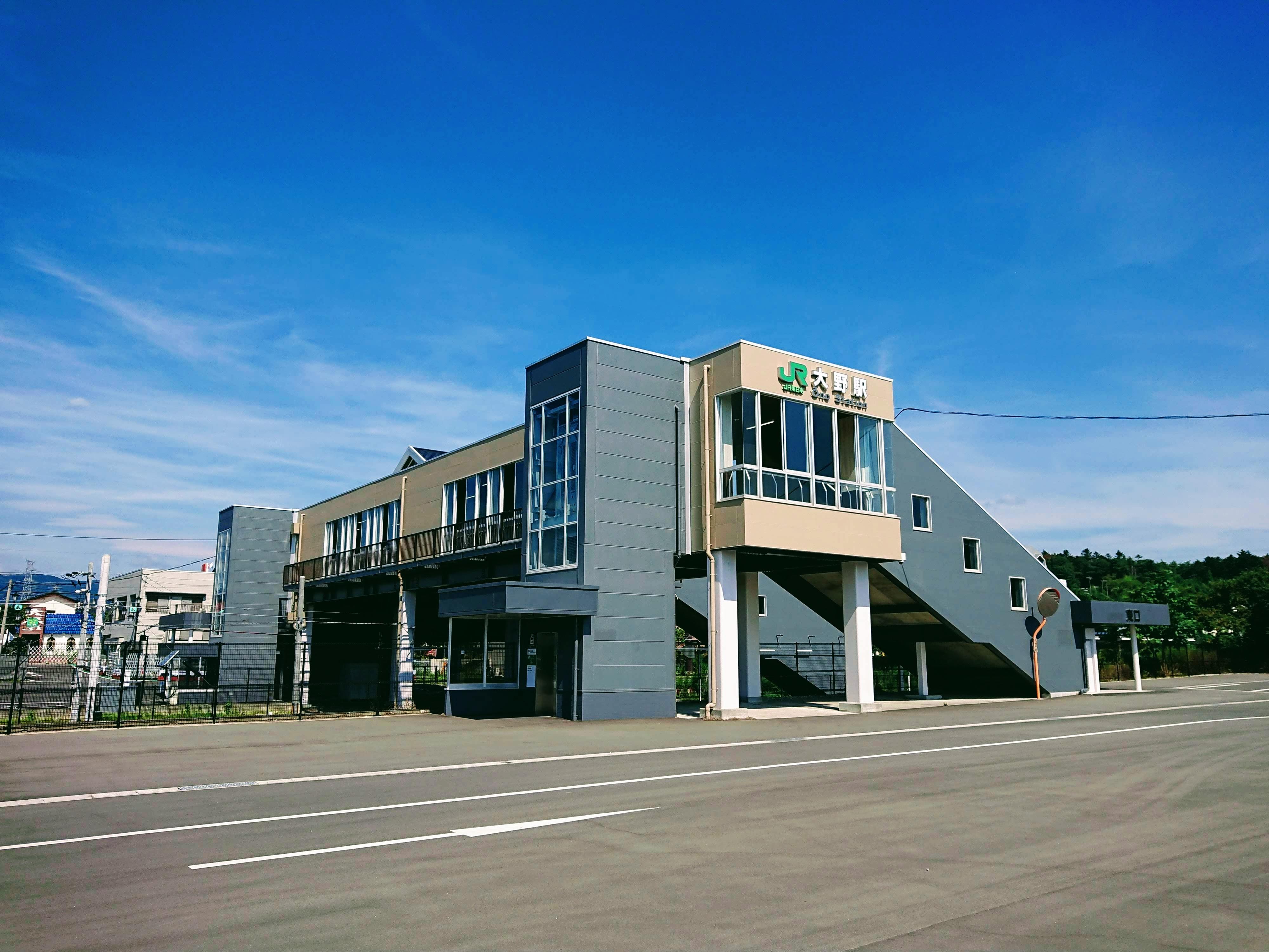 JR東日本 常磐線 大野駅 東口